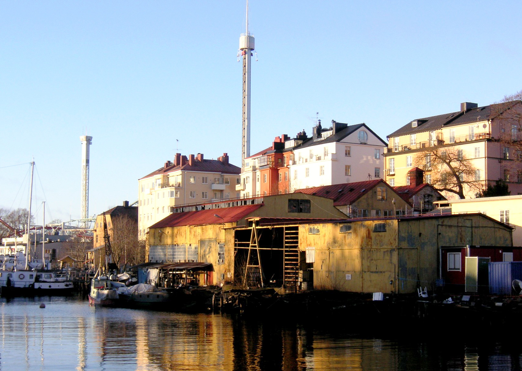 Djurgårdsvarvet i Stockholm